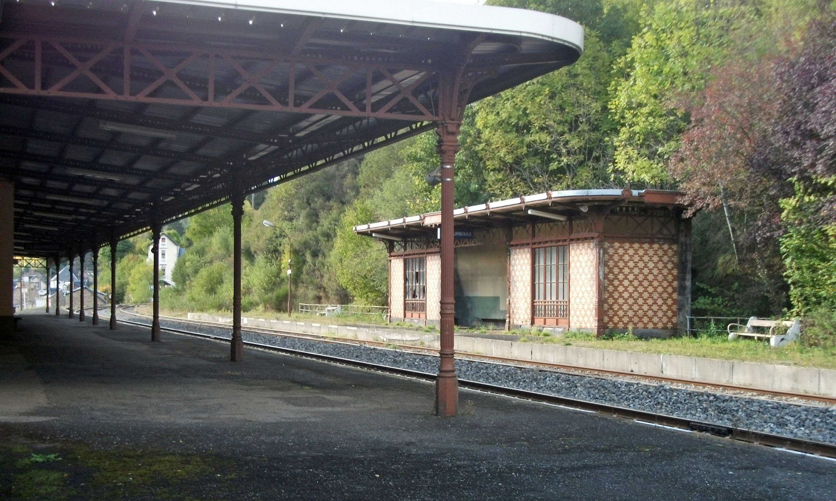 Voies de la gare de La Bourboule, depuis l'extérieur de la gare (ligne de Laqueuille au Mont-Dore).